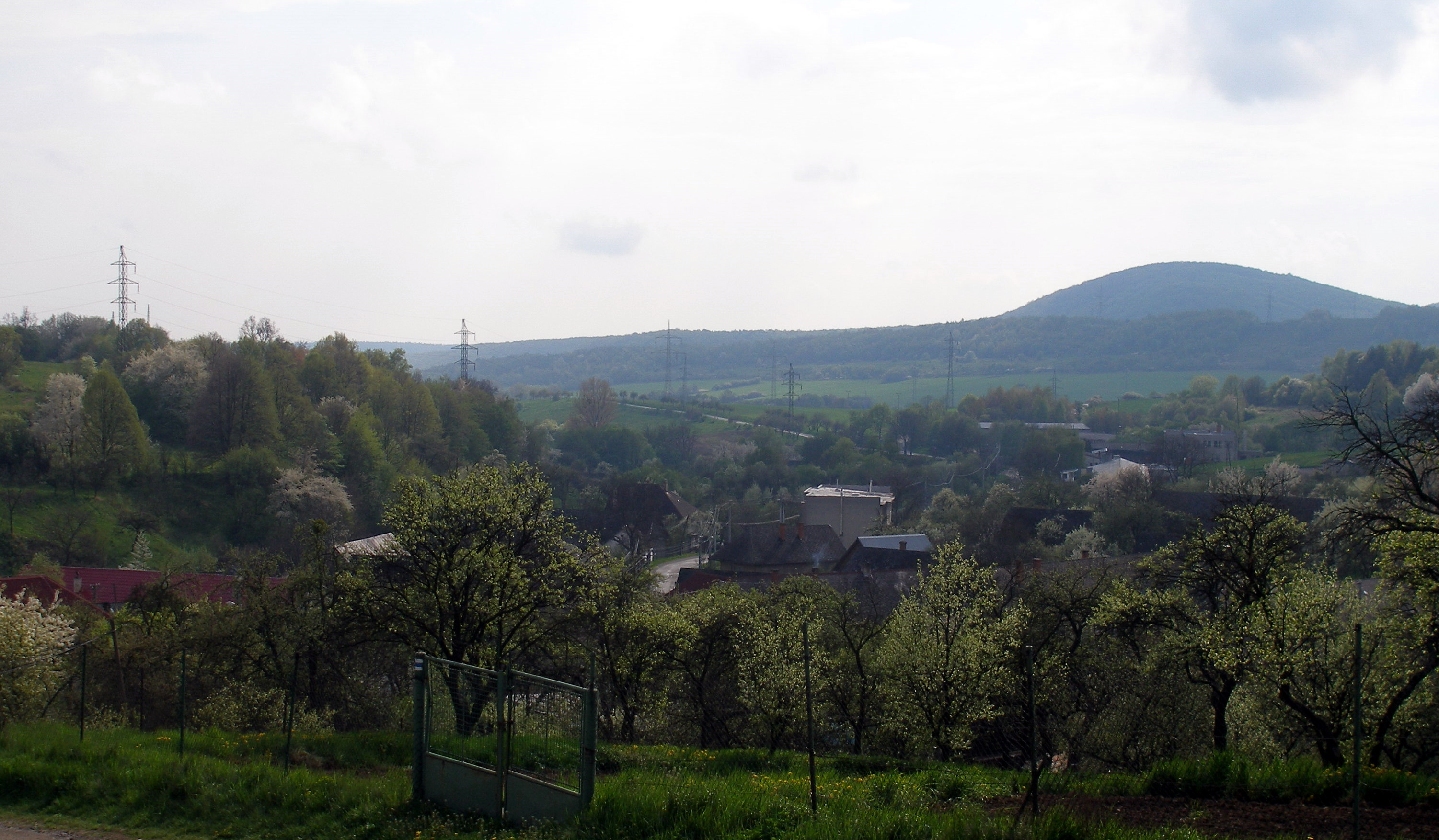 Obec Červenica okres Prešov región Šariš